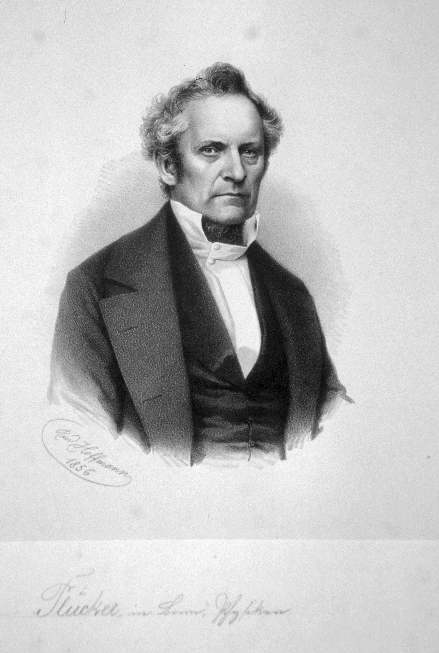 Julius Plücker (1801-1868), deutsche Mathematiker und Physiker. Lithographie von Rudolf Hoffmann, 1856.